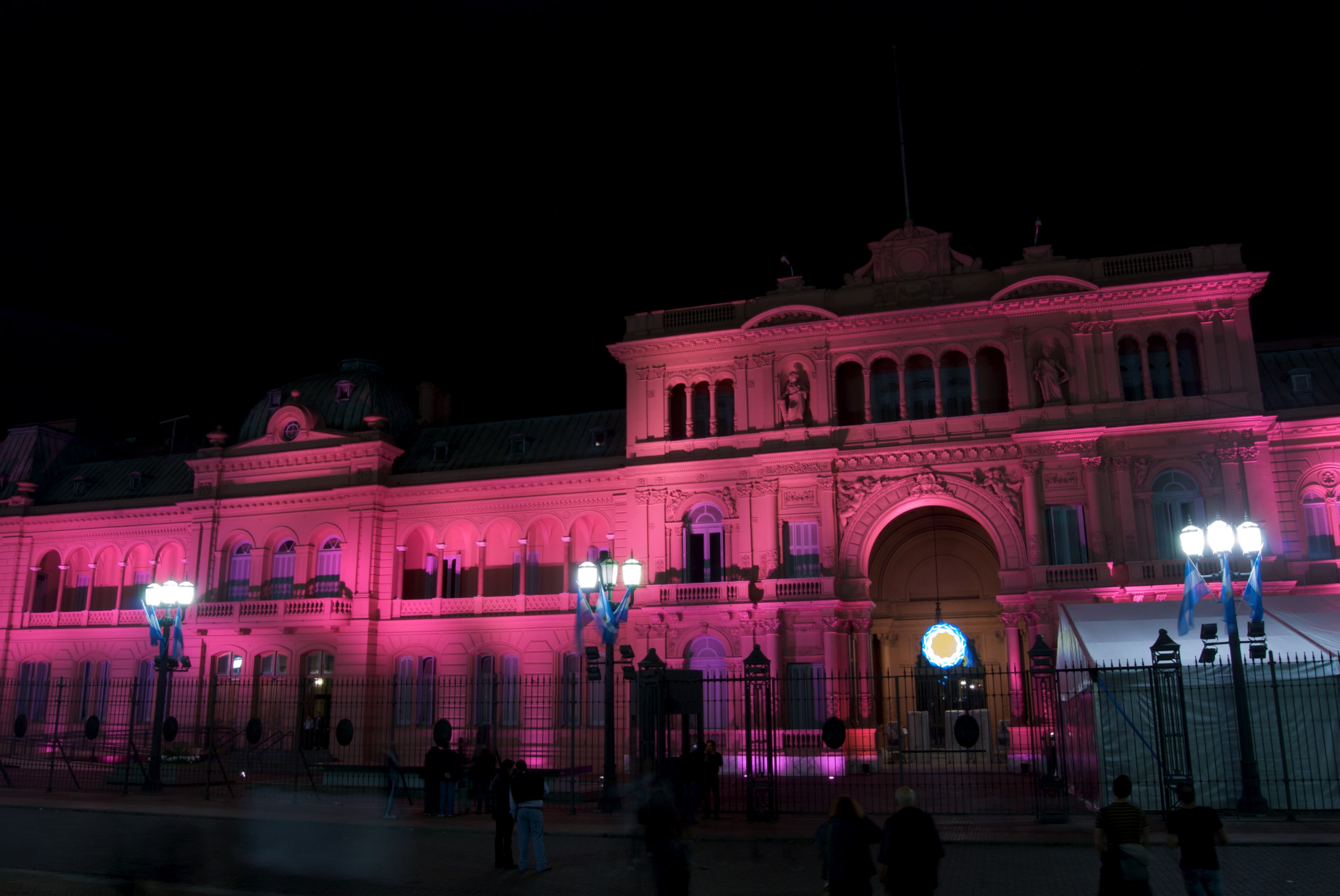 Casa Rosada durante el bicentenario argentino.